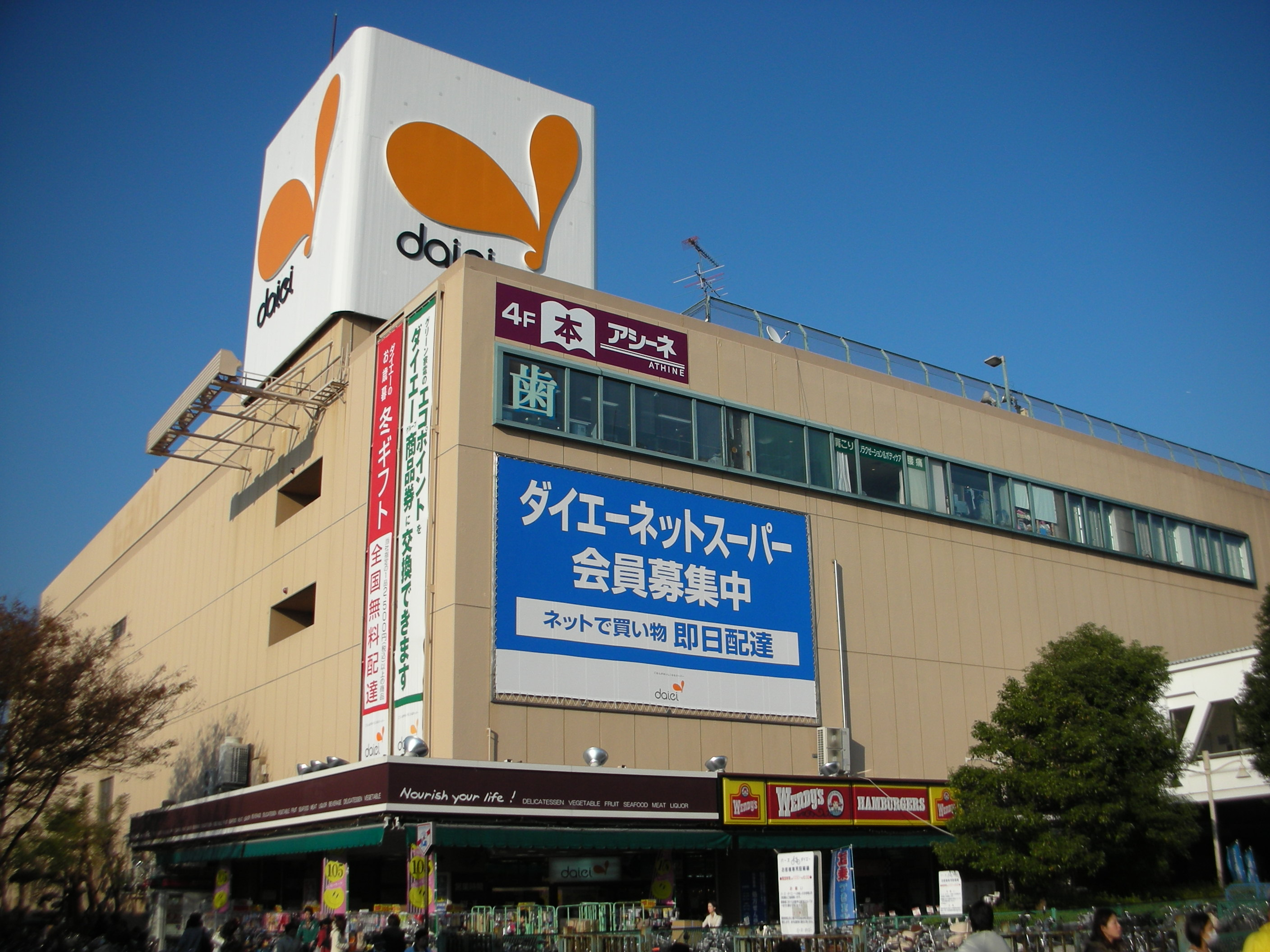 ダイエー港南台店の外観